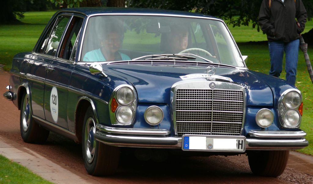 Mercedes-Benz 250 SE